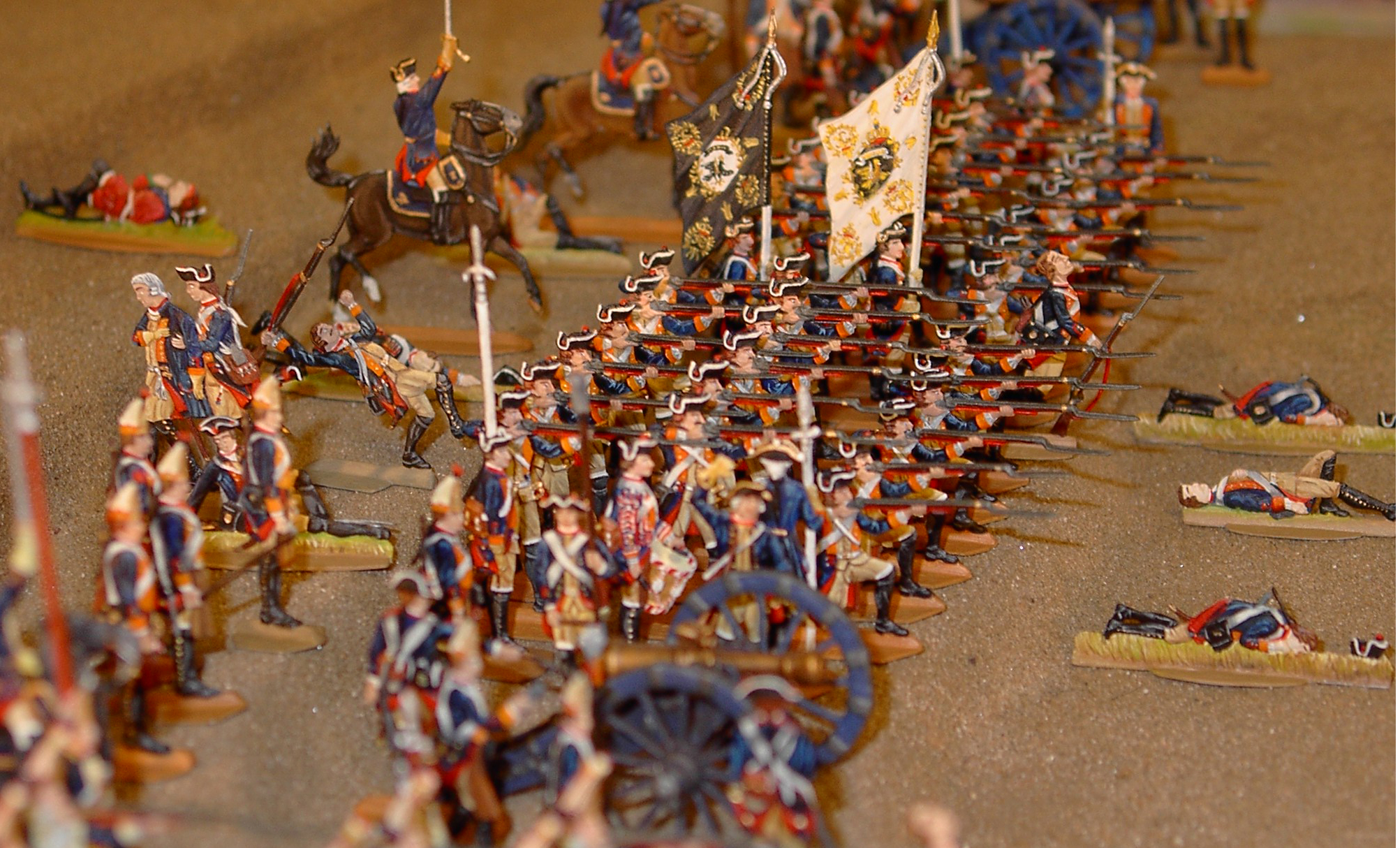 Darstellung eines Ausschnittes der Schlacht von Kunersdorf 1757 mit Flachzinnfiguren Möglichkeiten zur Lizenzierung